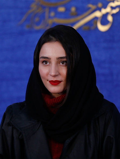 سها نیاستی در سی و هفتمین جشنواره فیلم فجر